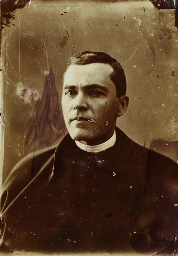 Retrat de mossèn Jacint Verdaguer